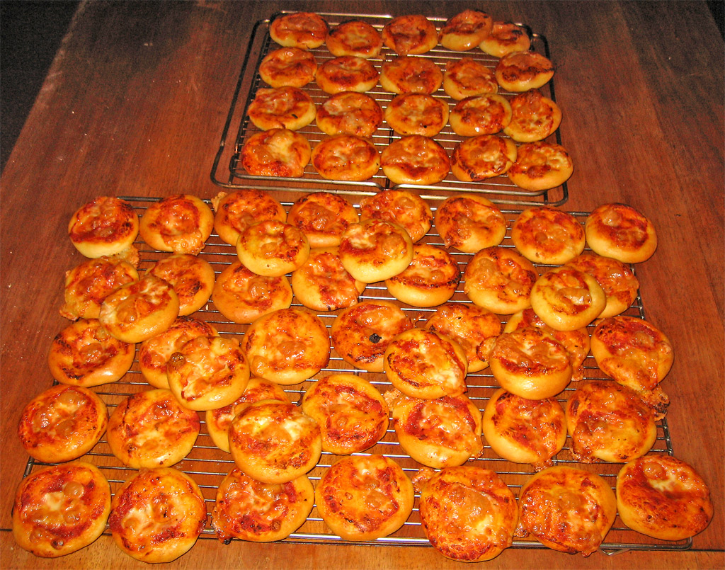 pezzatura da 25 gr ricette/recipe sul mio Blog